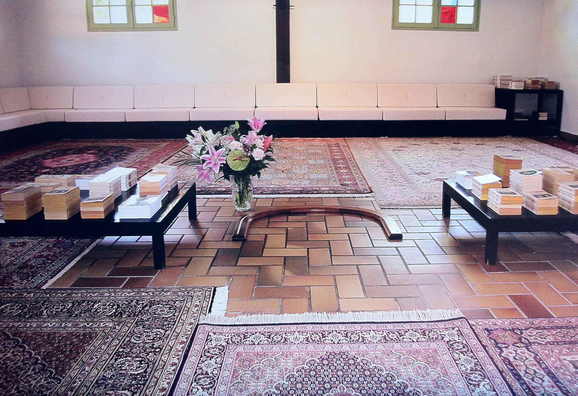 Maison de la Sainte Parole à Arès : Lieu de prière pour les Pèlerins d'Arès.